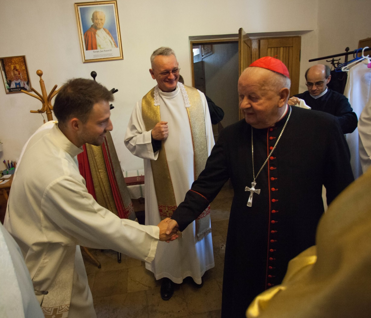 Kard. Dziwisz w zakrystii Bazyliki Mniejszej w Tuchowie przed udzieleniem święceń kapłańskich diakonom redemptorystom.